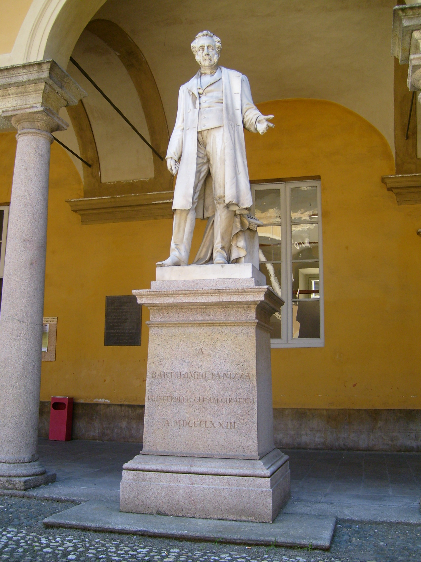 Statua di Bartolomeo Panizza, particolare del basamento, Cortile delle statue, Strada Nuova, Università di Pavia, Italy